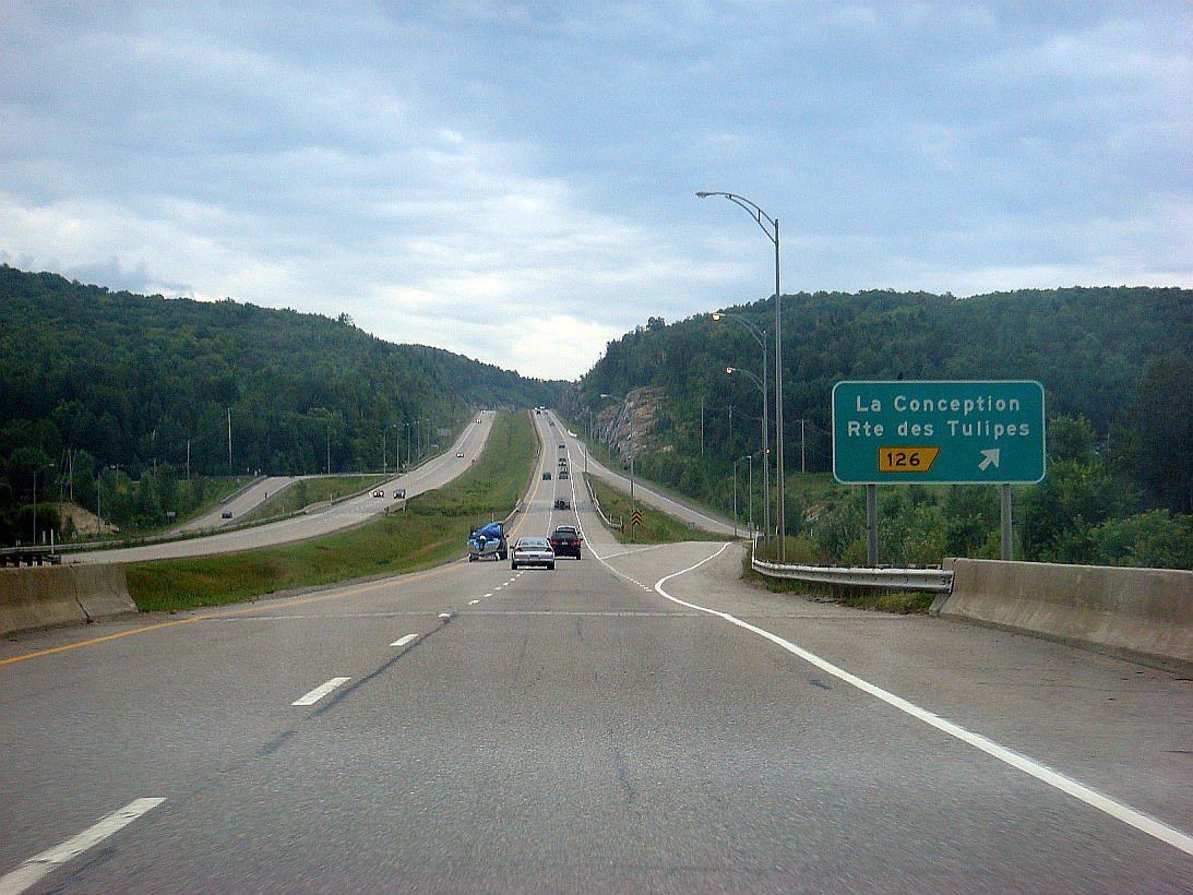 Route québécoise 177 direction sud, aux environs de Mont-Tremblant. Cette route fait partie de la route transcanadienne.